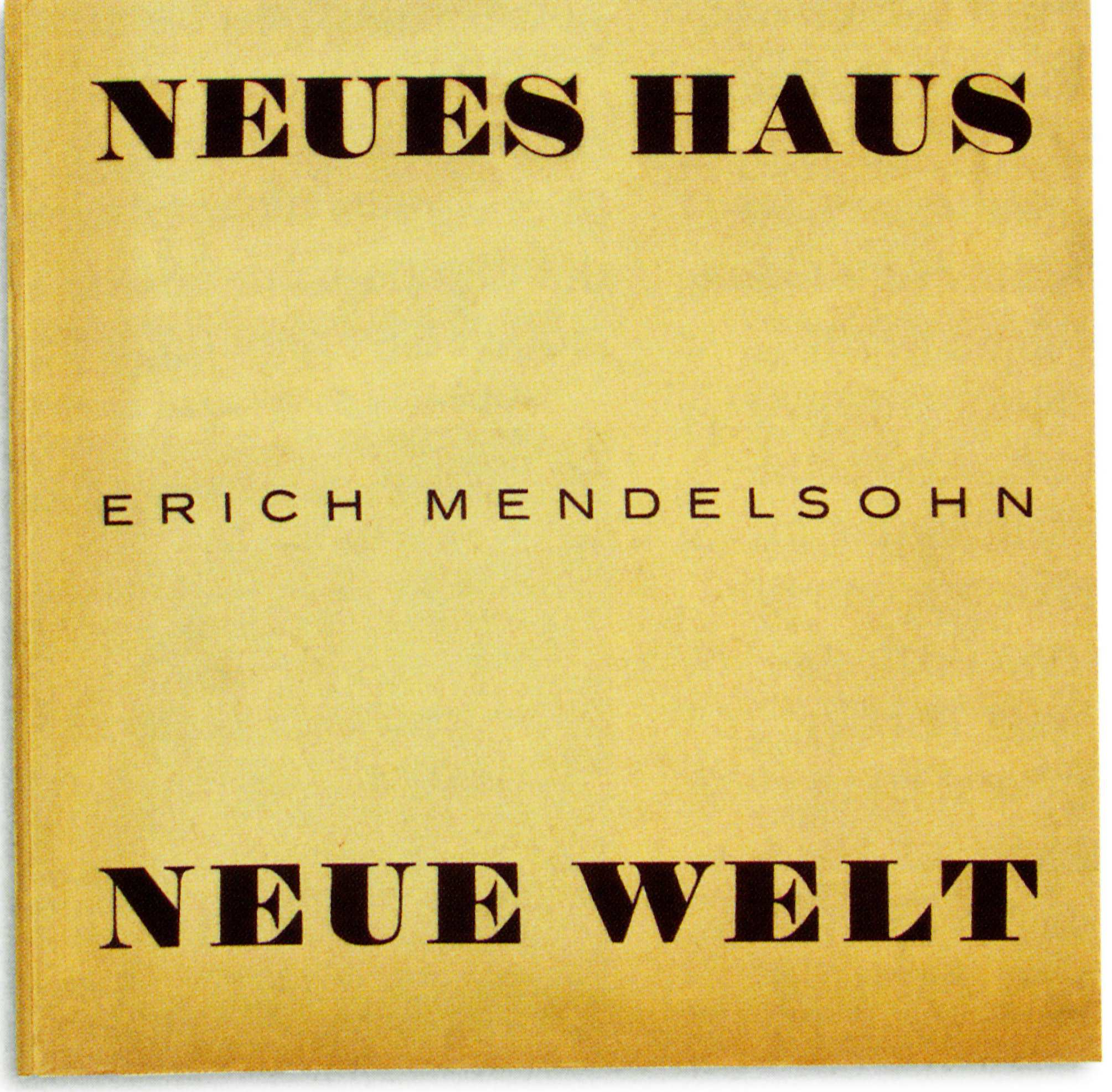 Erich Mendelsohn Neues Haus Neue Welt Einband 1932